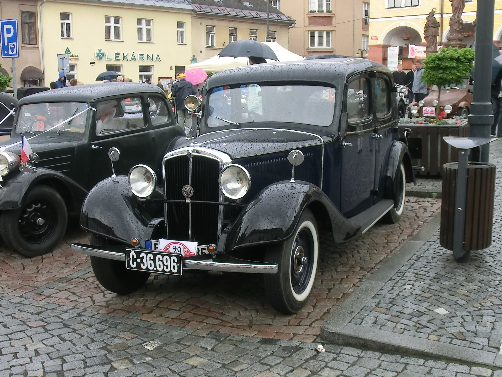 Jilemnice, akce Tatra v Českém ráji 2014.